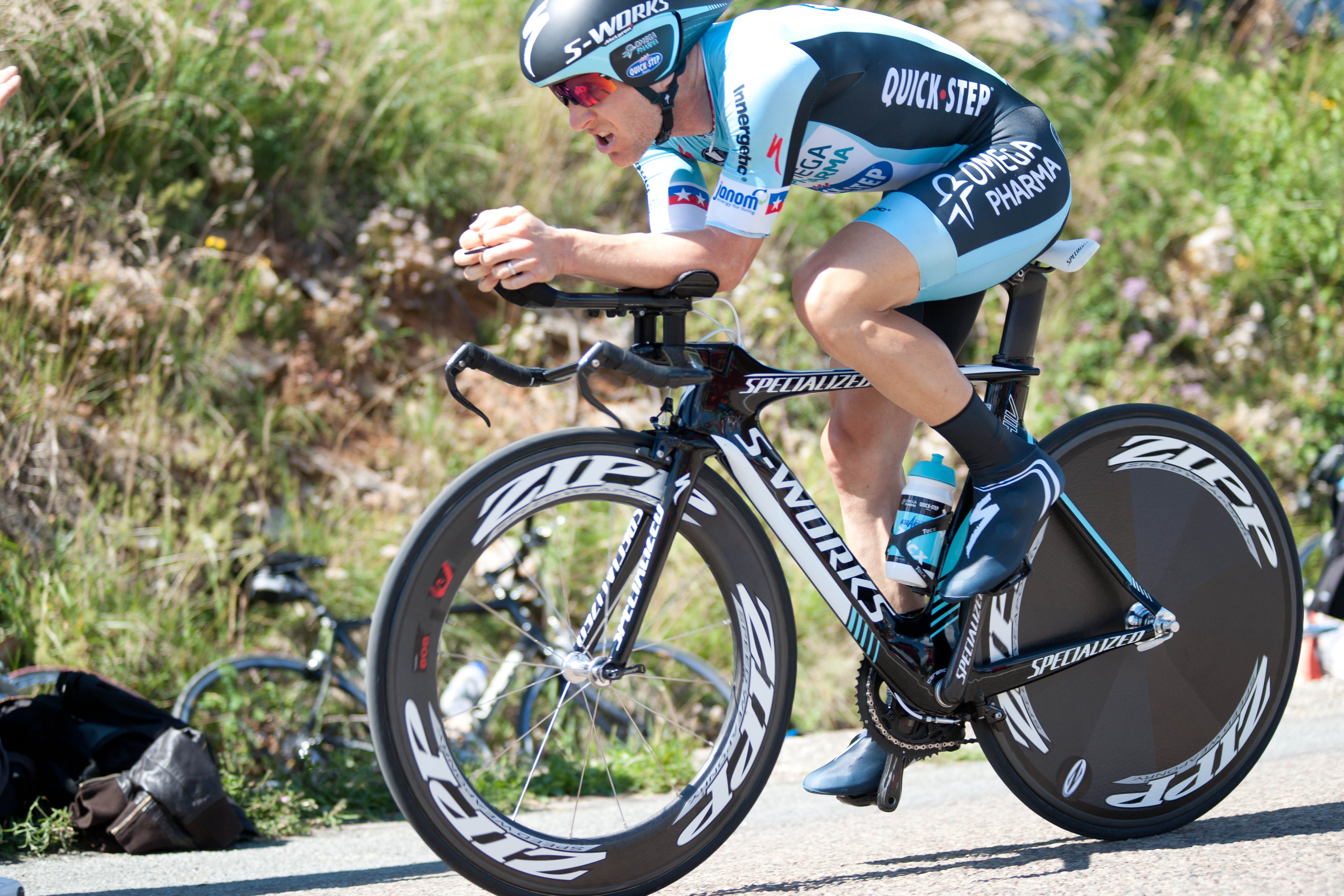 Levi Leiphemer - TDF 2012